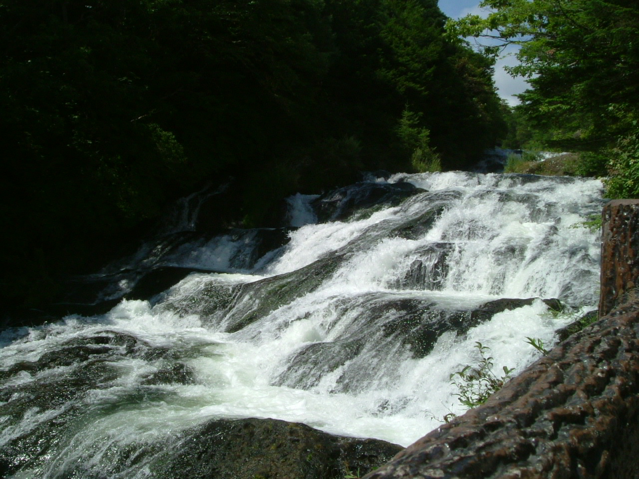 栃木県日光市竜頭の滝（上部）